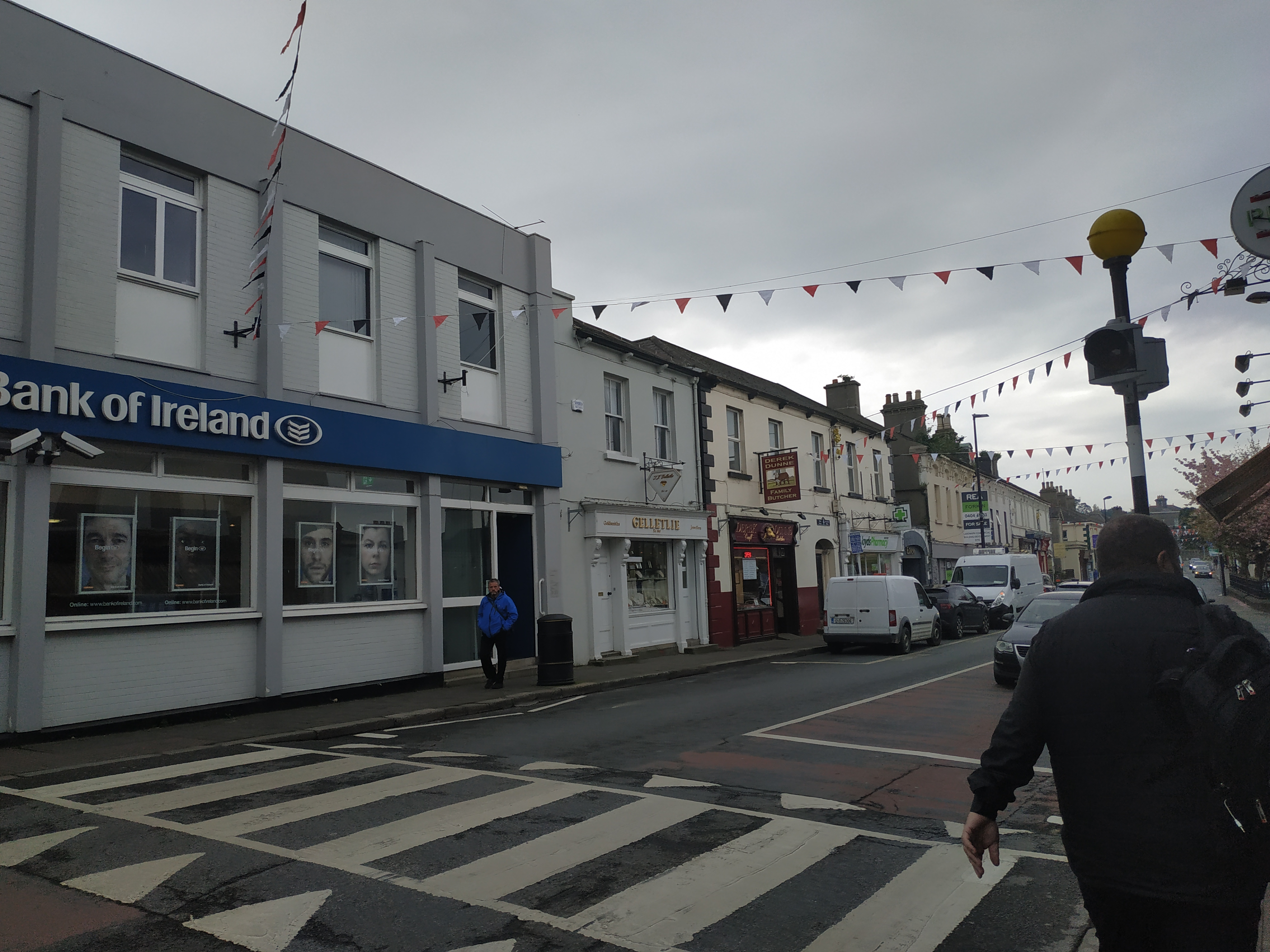 Wicklow, Republic of Ireland.